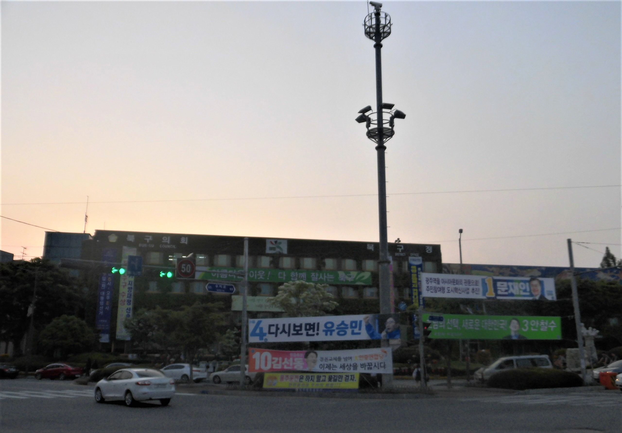 광주광역시 북구에 있는 북구청